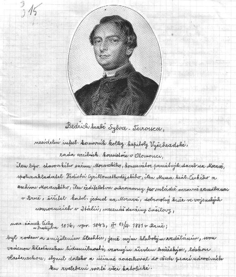 Václav Petera: Bedřich Silva-Tarouca